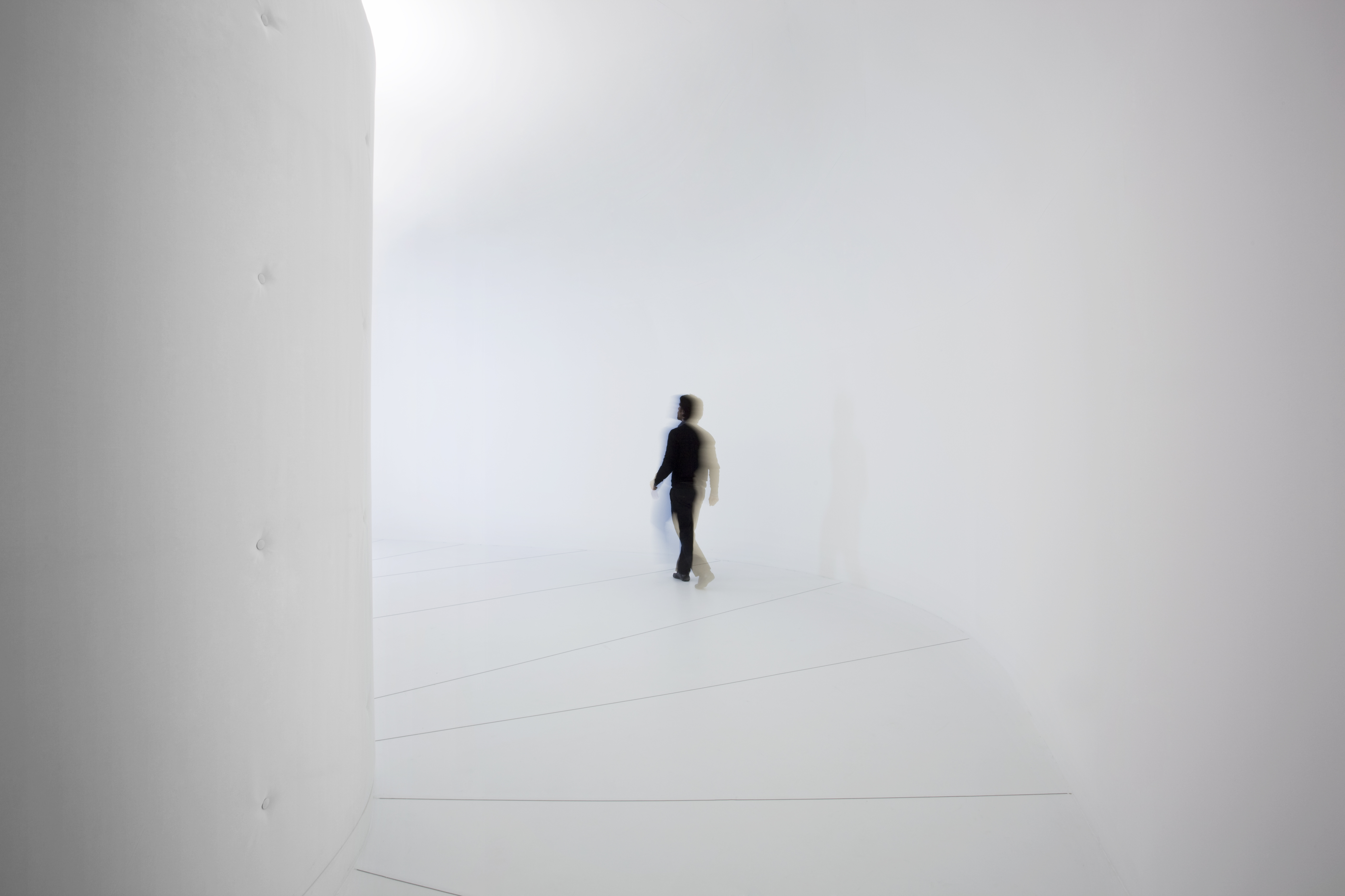 Iniciarte